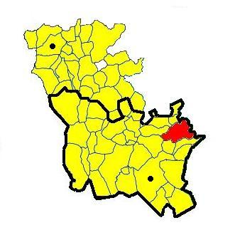 Localisation de Honrubia dans la comarque de La Mancha de Cuenca.